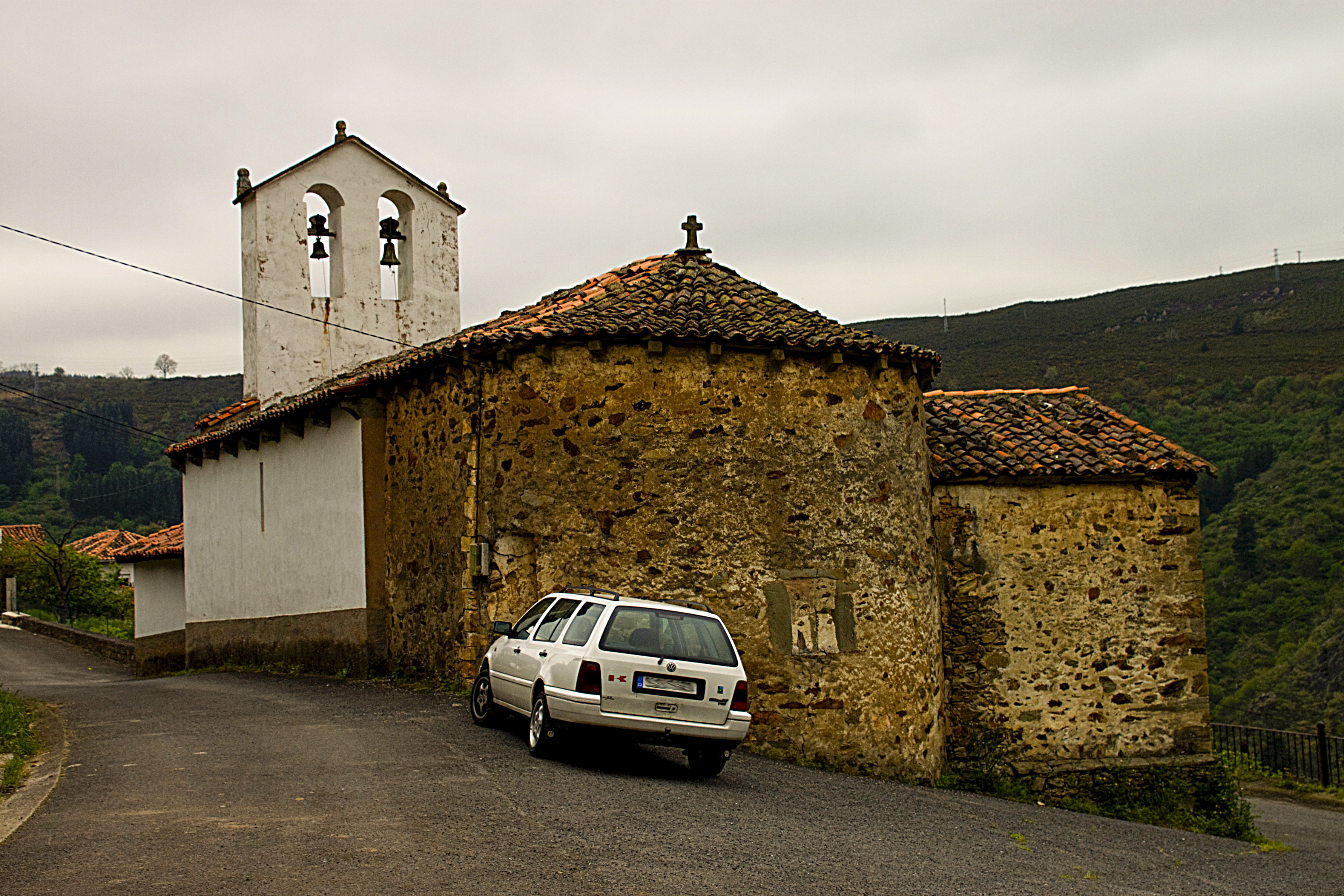 Tebongo, Cangas del Narcea, Asturias